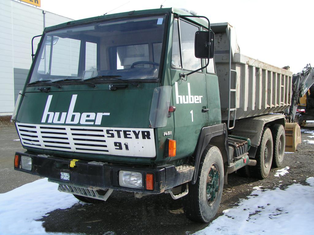 Steyr 91 Quelle/Fotograf: Richard Bleichmann